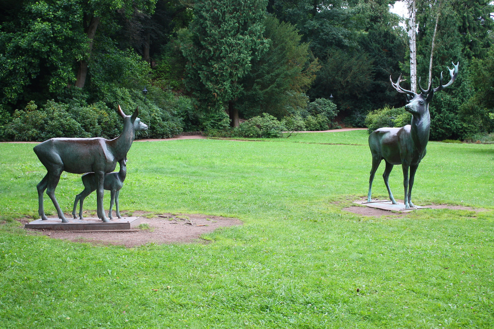 Diese Bronzeplastik war ursprünglich am Jägerhof in Wilhelmsthal aufgestellt und ziert nun den Kartausgarten in Eisenach.